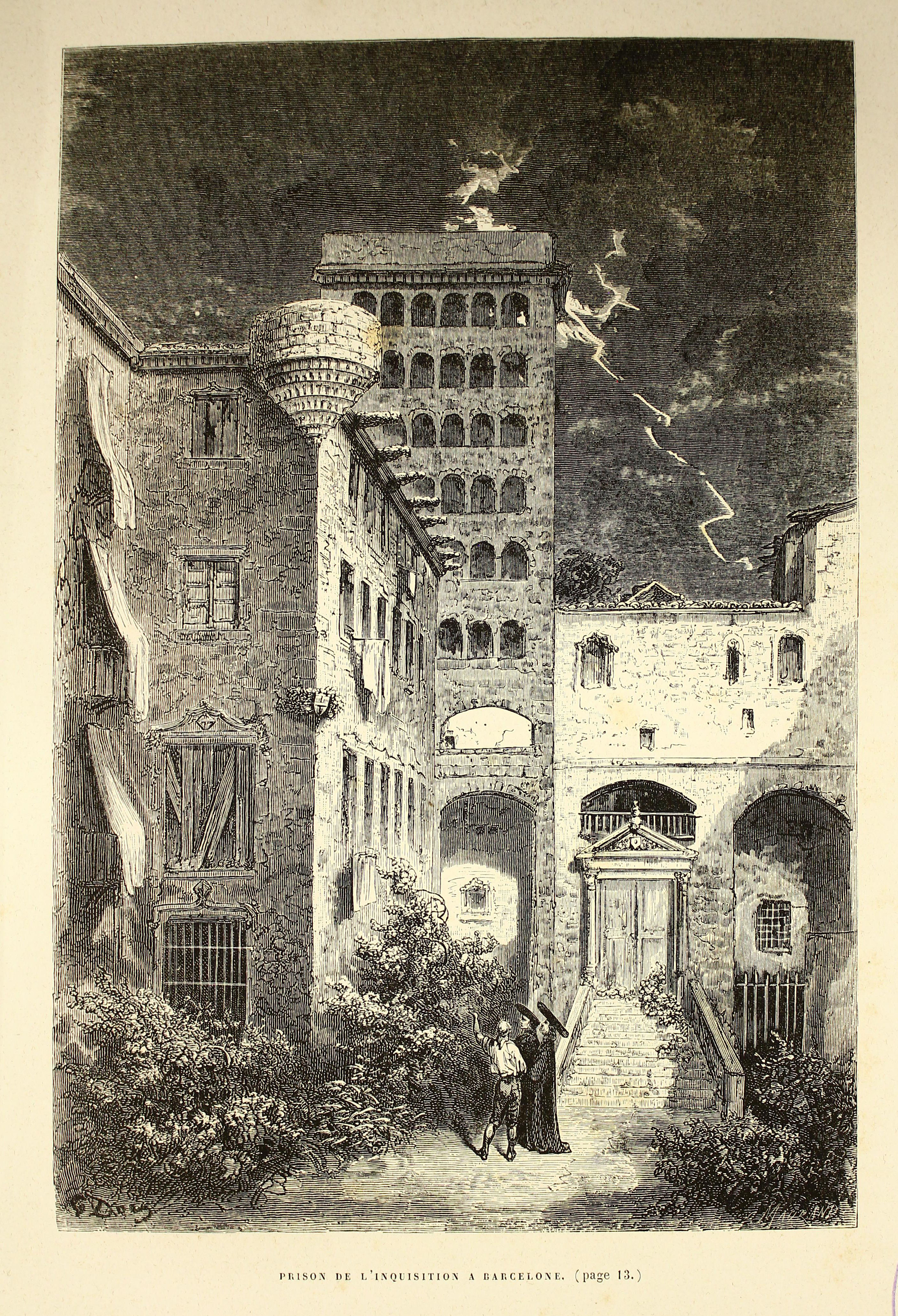 Autor: Davillier, Jean Charles, barón, 1823-1883 Descripción bibliográfica: L'Espagne / par Le Baron CH. Davillier ; ilustrée de 309 gravures dessinées su bois par Gustave Doré. - Paris : Librairie Hachette, 1874. - 799 p. : il. Materia: España- Geografía Materia: España- Usos y costumbres Ilustrador: Doré, Gustave, 1832-1883 Editor: Libreria Hachette Lugar de impresión: Francia, París Localización: Libro completo